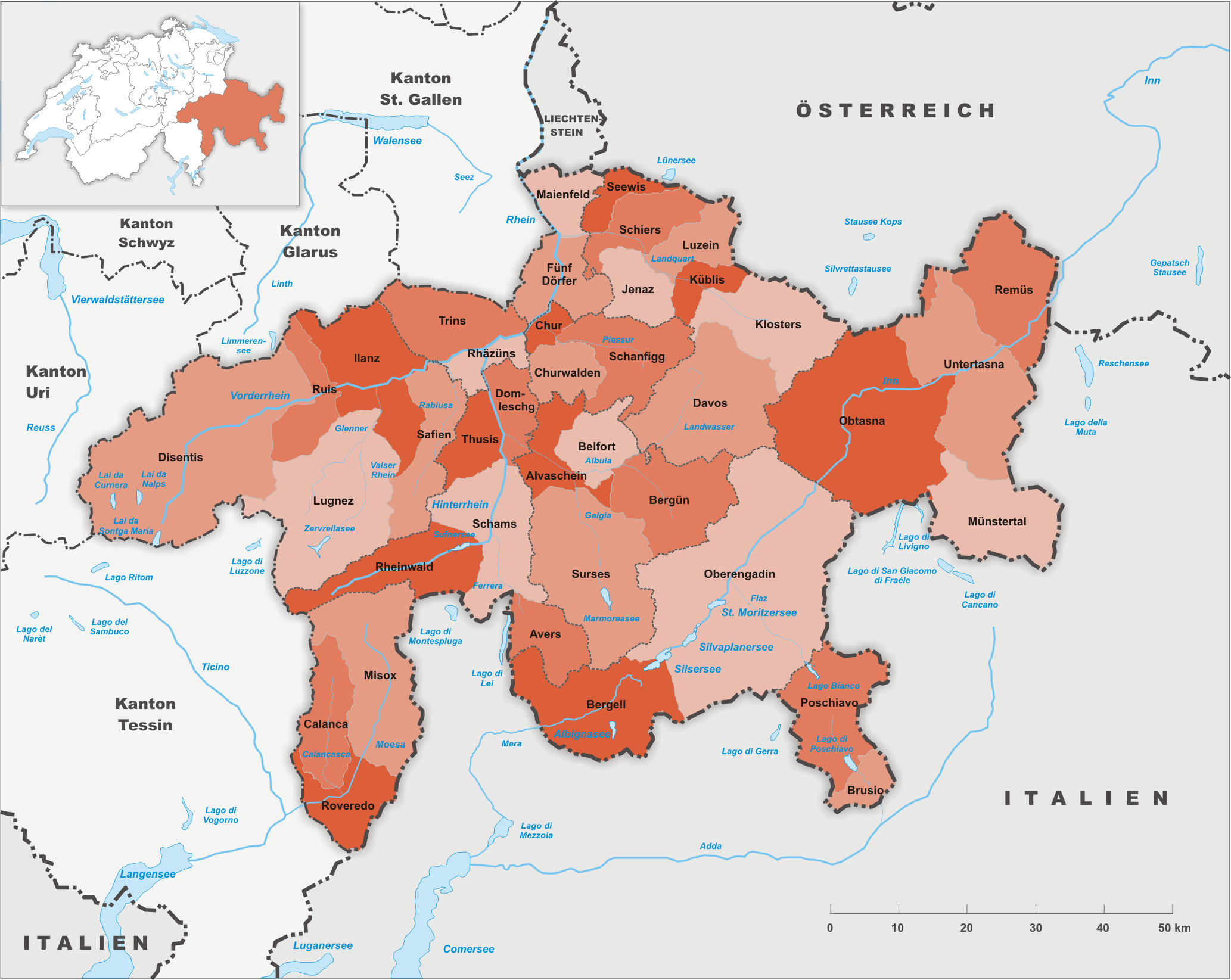 Kreise des Kanton Graubünden